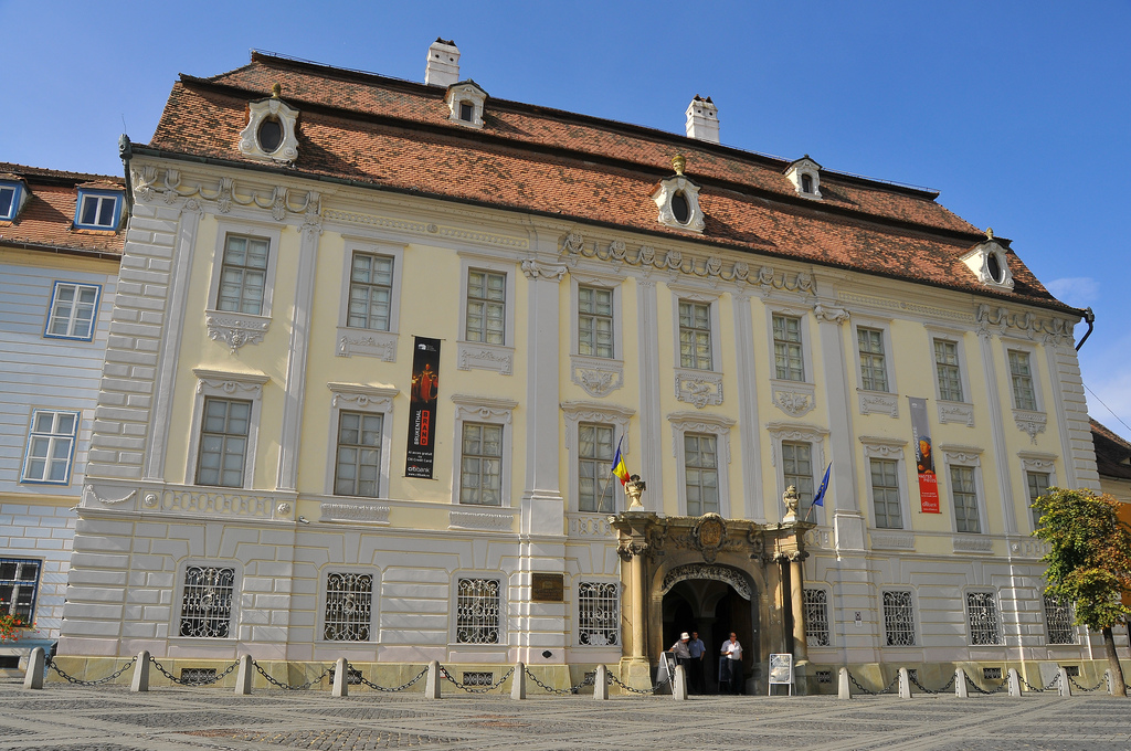 Muzeul Brukenthal (piata mare)